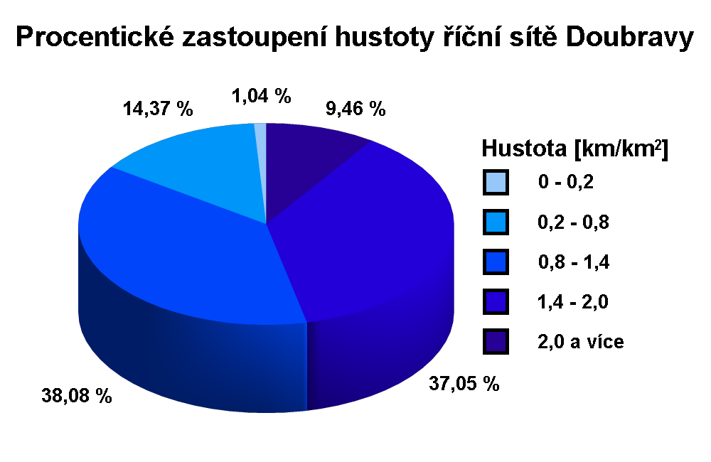 Procentické zastoupení hustoty říční sítě Doubravy